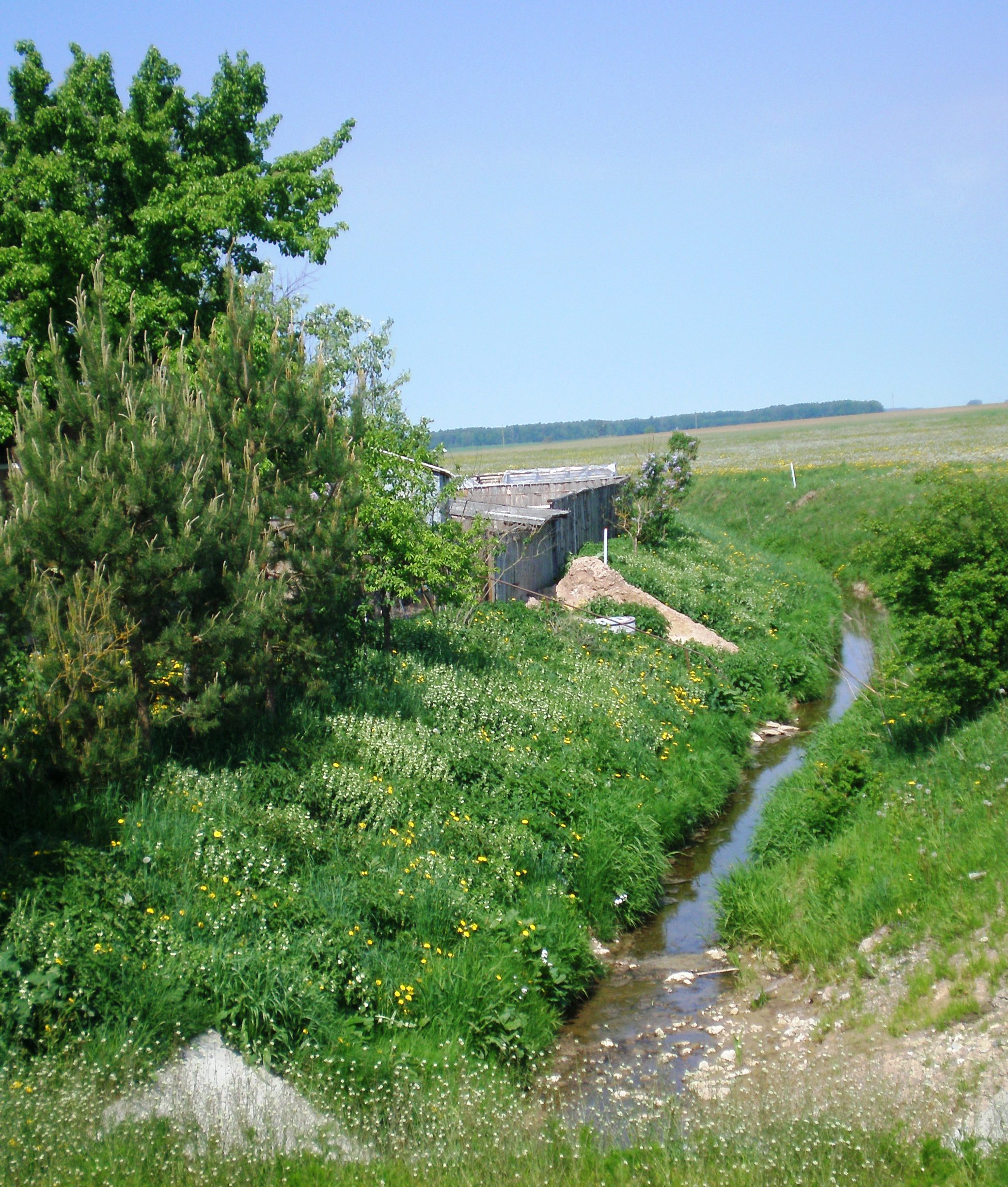 Kačupys Siponiuose, Kėdainių raj.